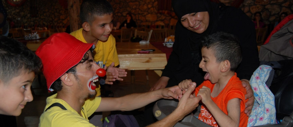 אדם ללא גבולות, ליצן